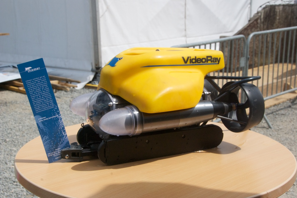 Tonnerres de Brest 2012 Le mini-ROV utilisé sur l'Haliotis